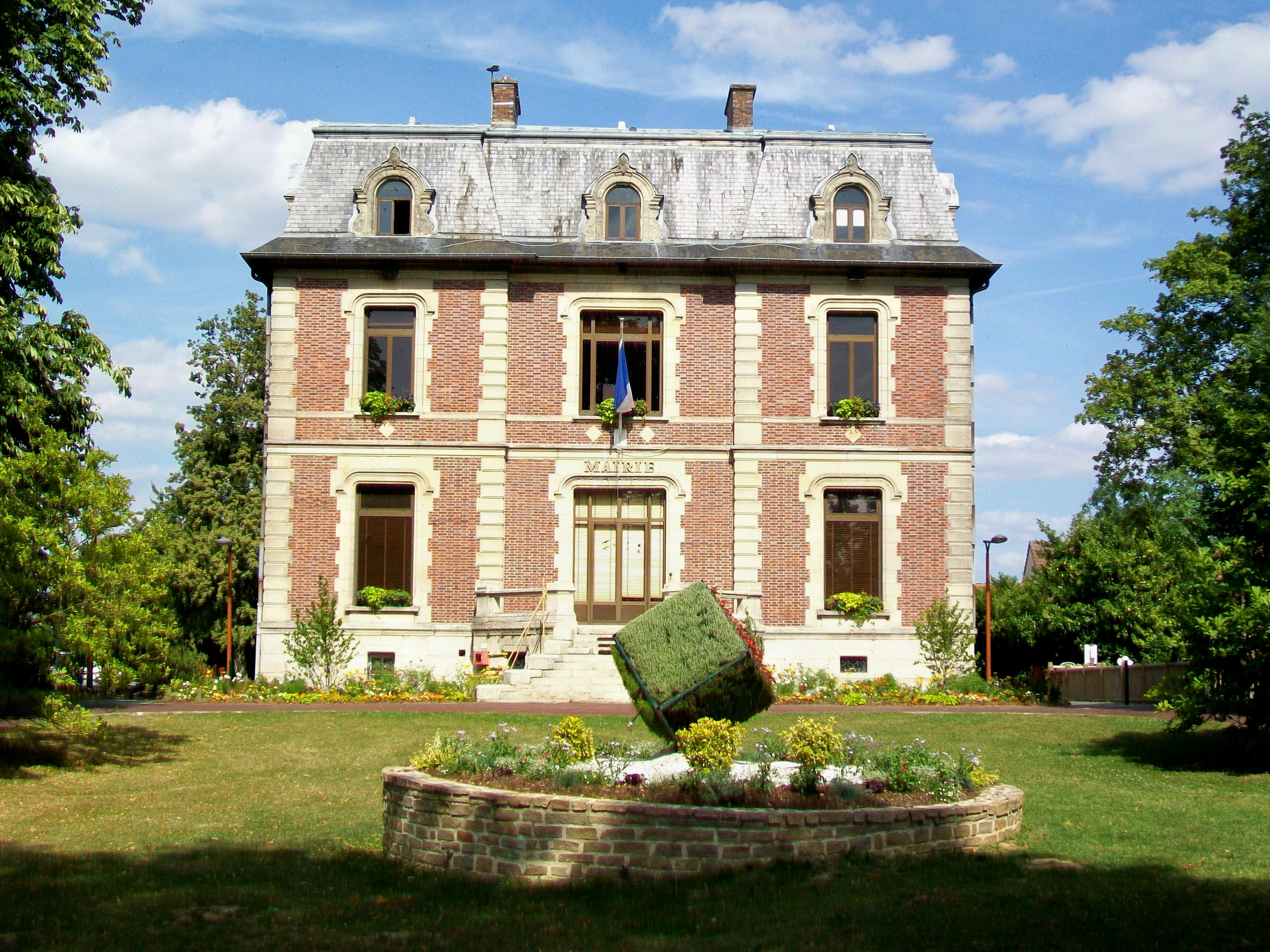 La mairie d'Othis (77).